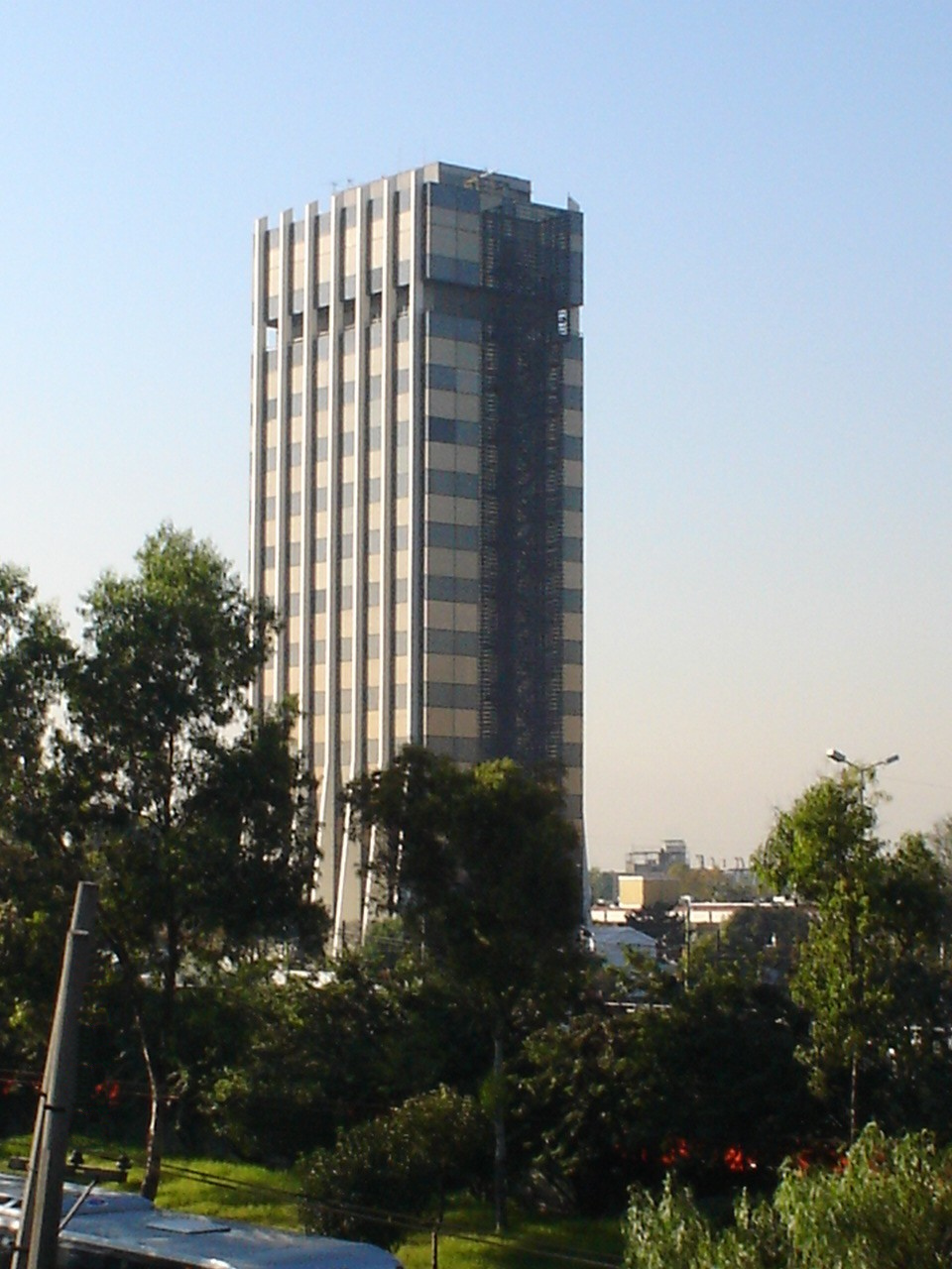 Oficinas centrales del Instituto Mexicano del Petróleo, sobre la avenida de los Cien Metros (nombre con el que es conocido el Eje Central Lázaro Cárdenas en su parte Norte) en la delegación Gustavo A. Madero de la Ciudad de México, D.F., México.